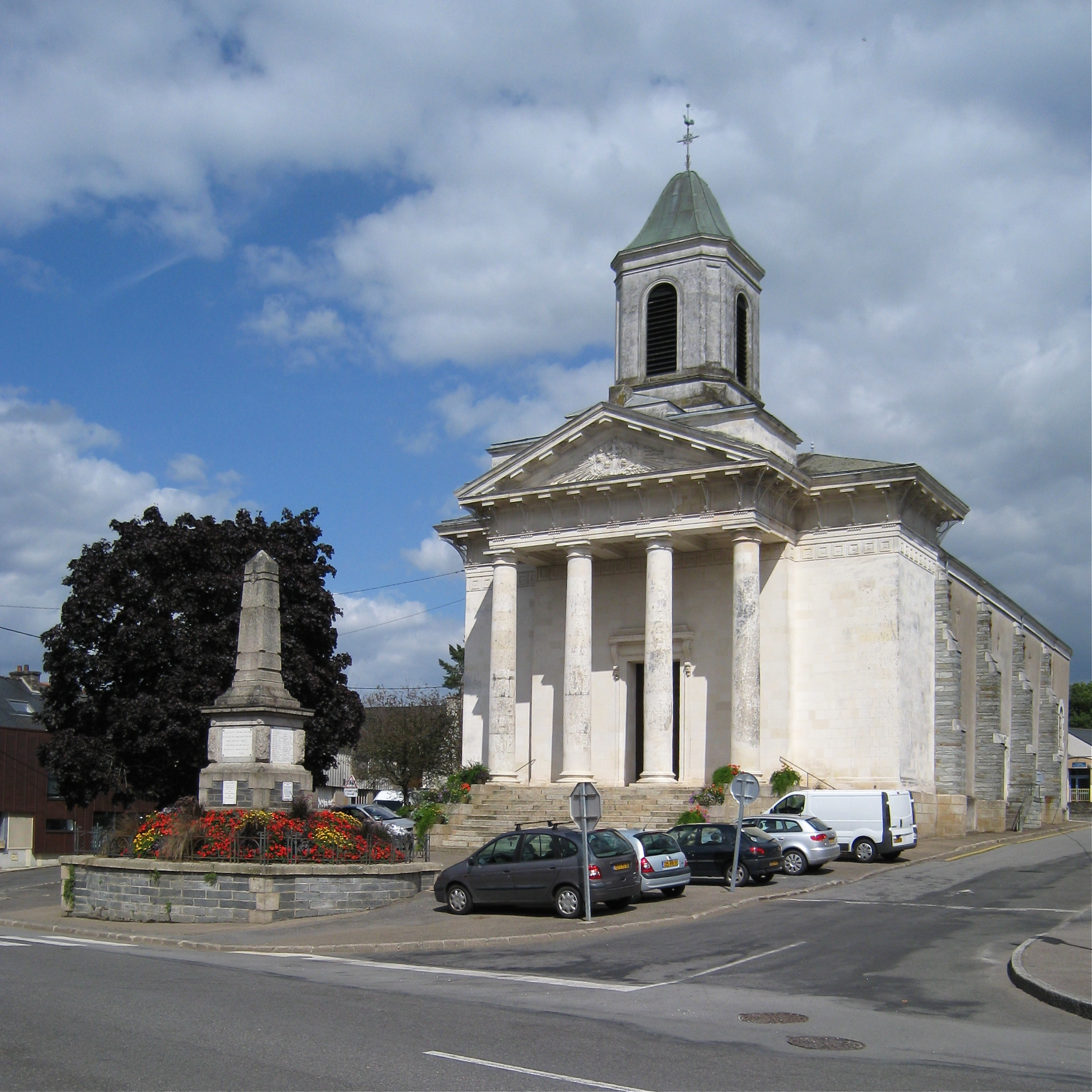 L'église de La Gacilly, Morbihan